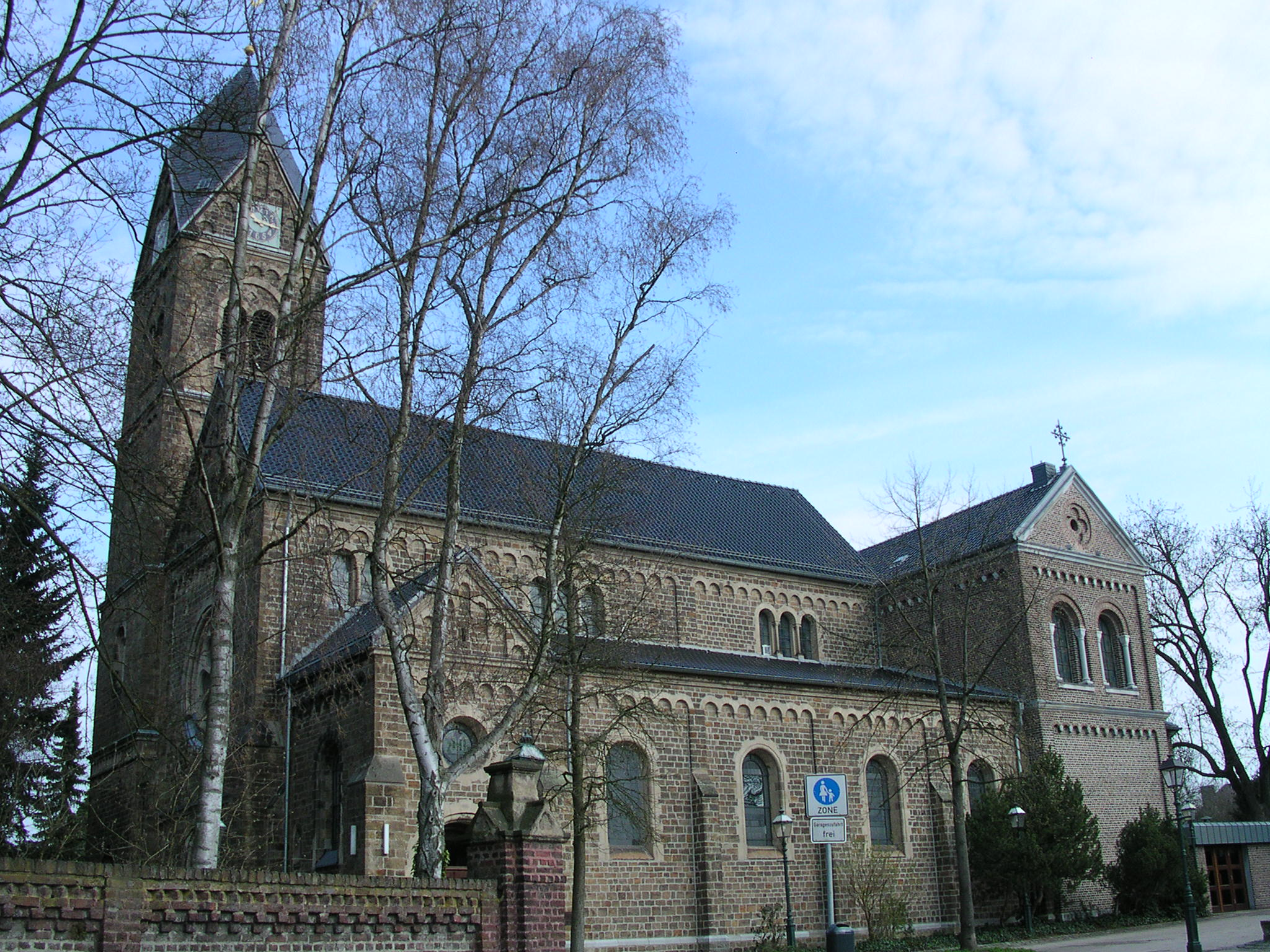 rk. Pfarrkirche St. Katharina in Aachen Forst, erbaut 1866 (Schiff) - 1890 (Turm)